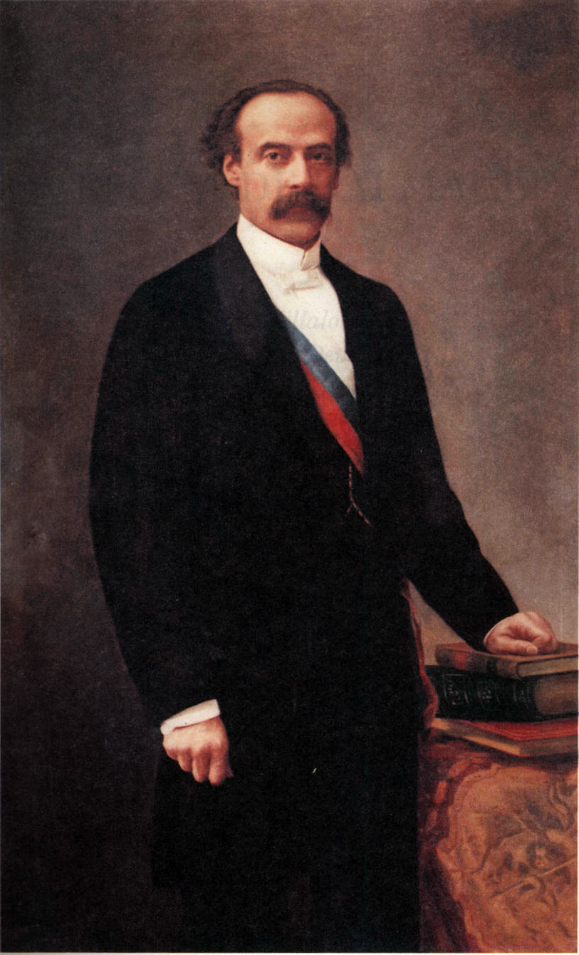 José Manuel Balmaceda Fernández (1840-1891) Presidente de Chile entre 1886 y 1891.